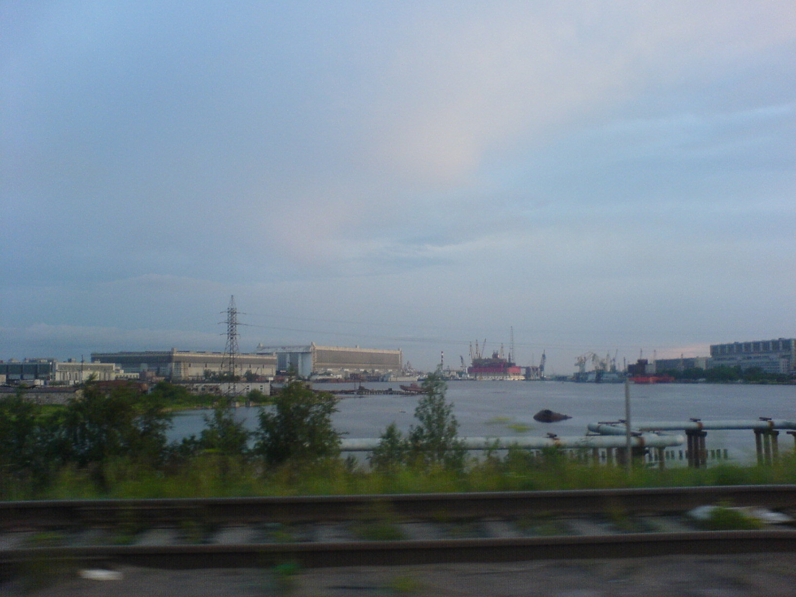 Северное машиностроительное предприятие, Северодвинск, 6 июля 2007 года. На правом берегу НПО "Звёздочка"